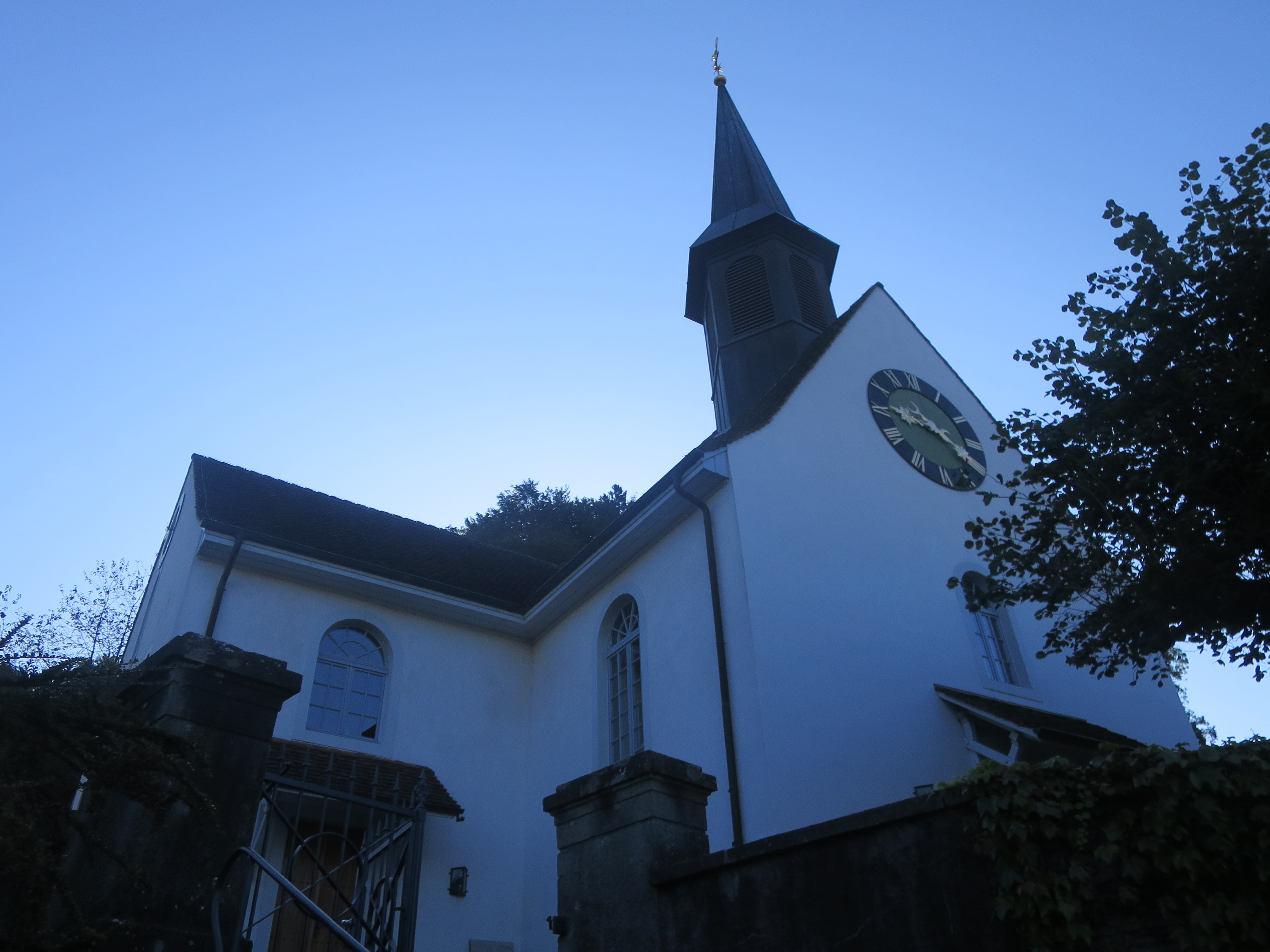 Reformierte Kirche Buus, Schweiz